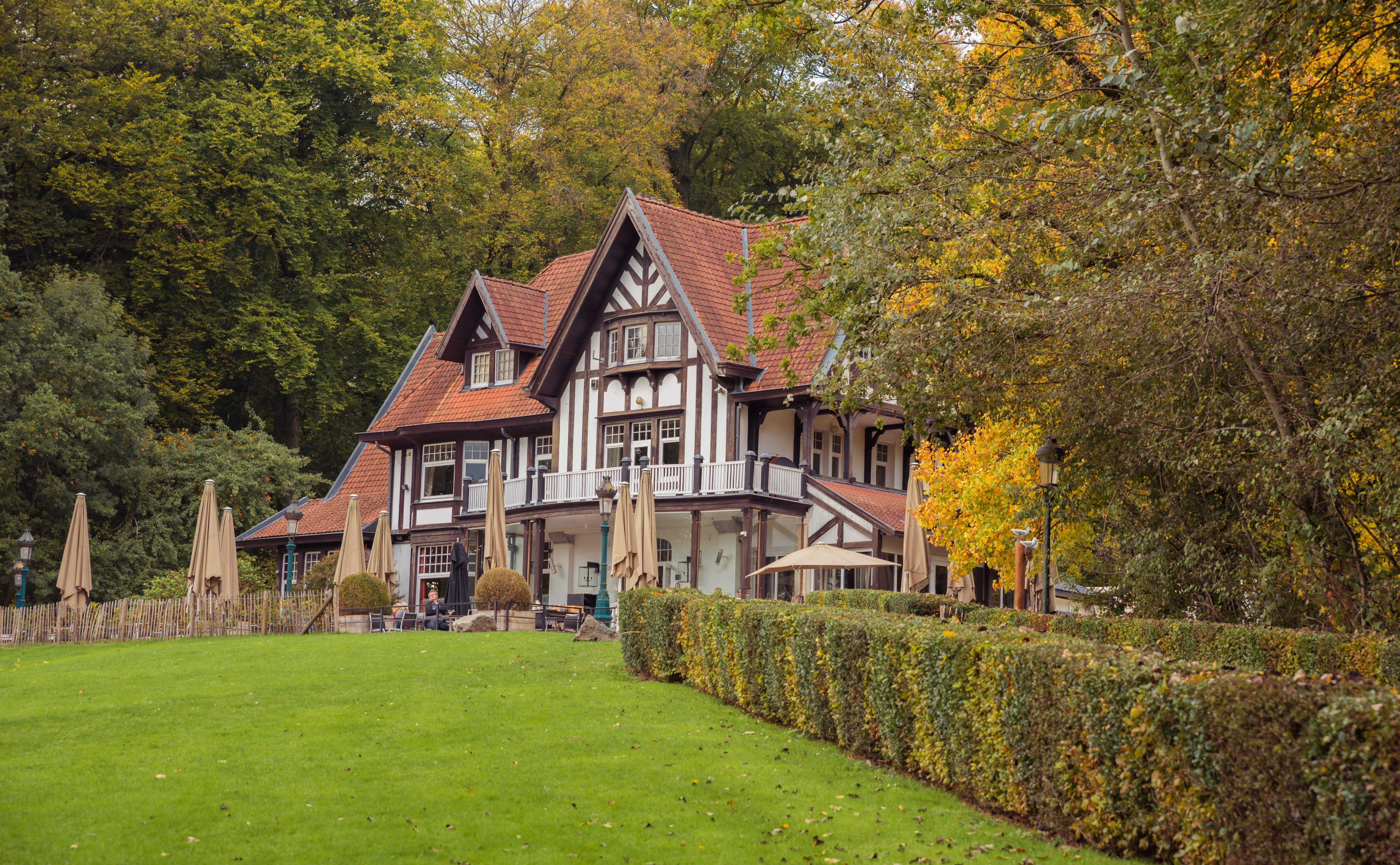 Chalet Laarbeekbos in de herfst genomen (Jette). Bewerking met Lightroom om de waargenomen kleuren terug te brengen.